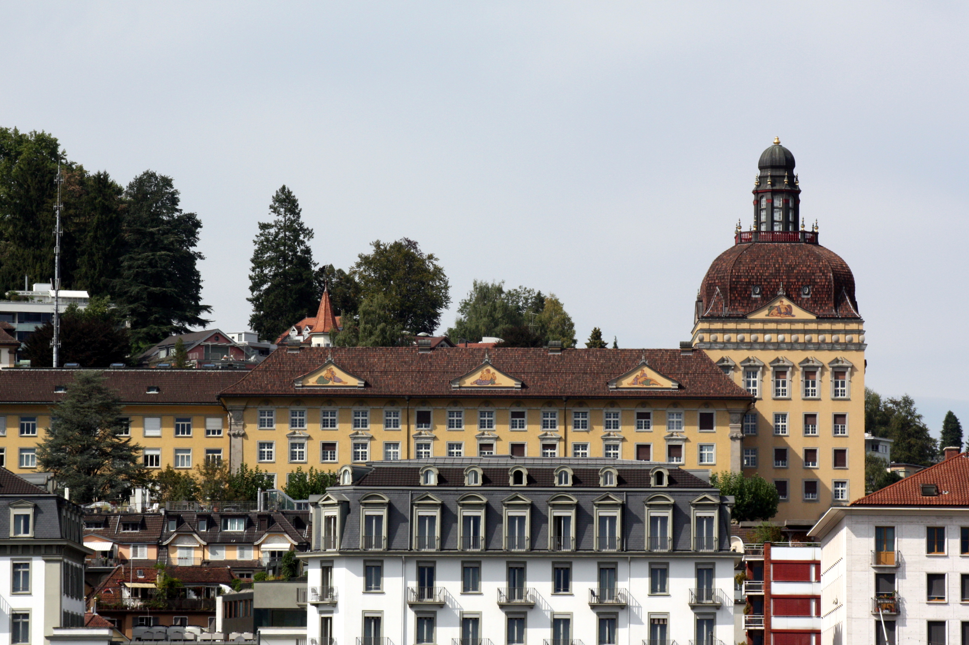 SUVA, Schw. Unfallversicherungsgesellschaft, Hauptsitz Luzern